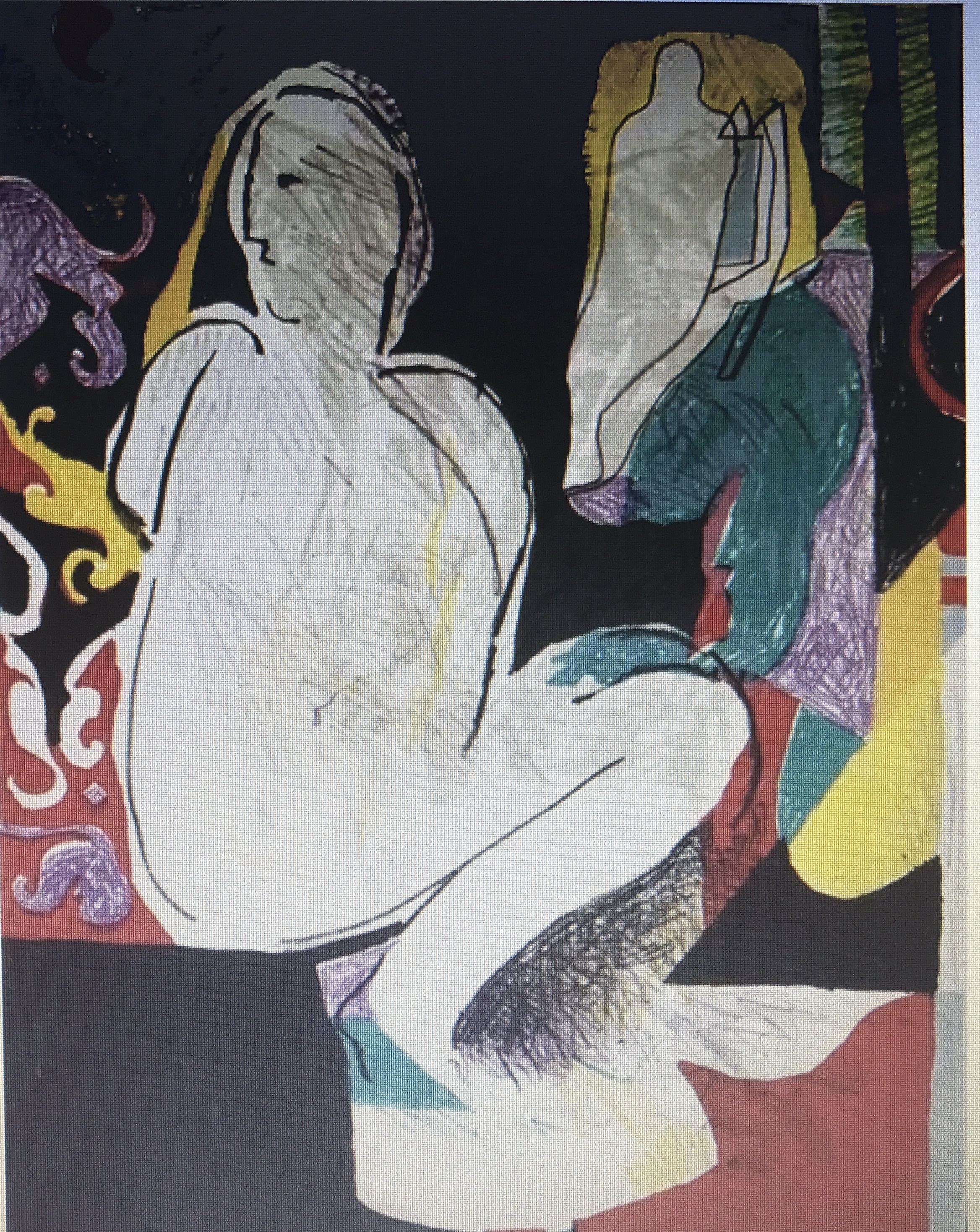 „Arabian Nights”, 1986